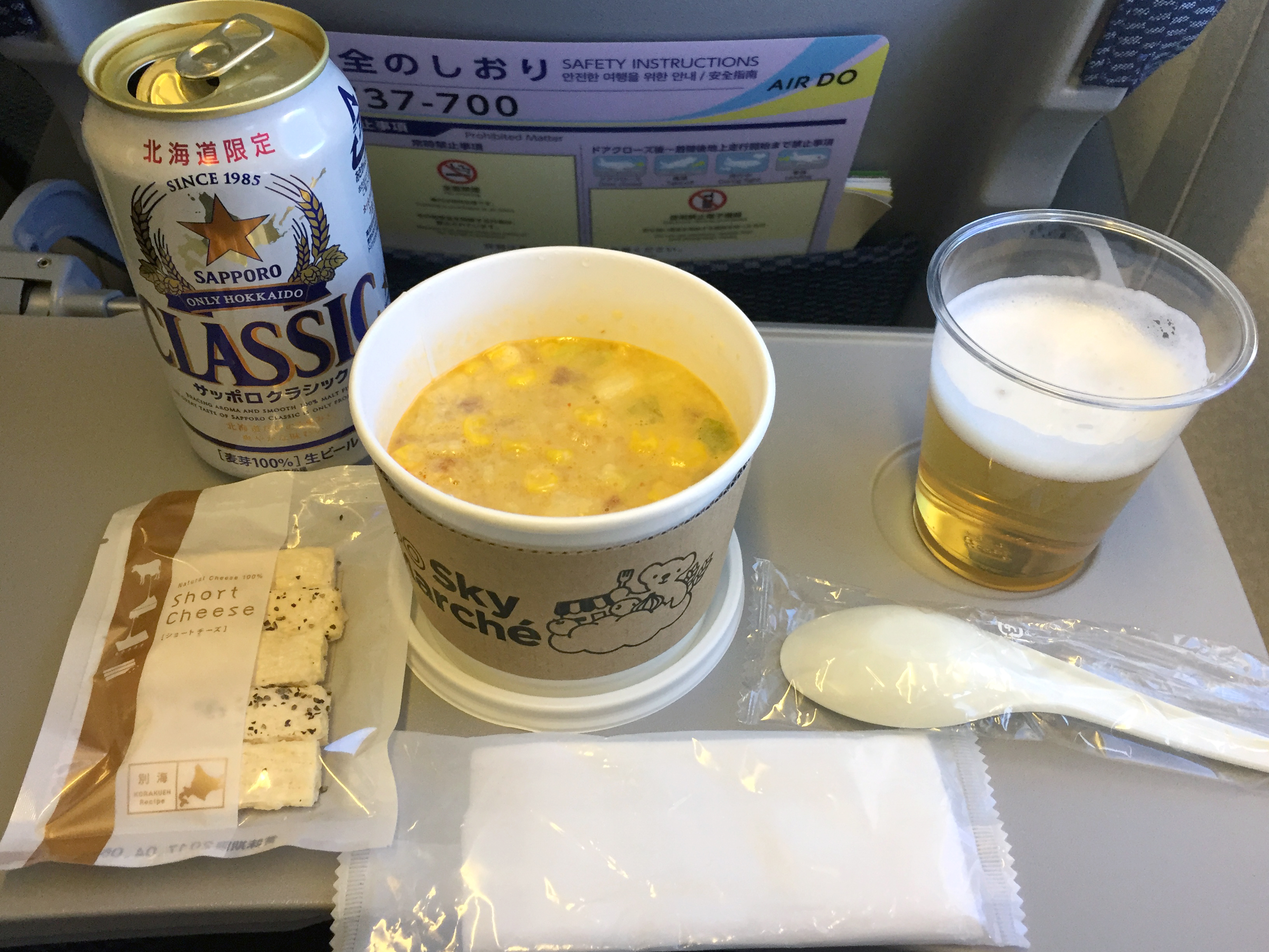 AIRDO機内食一例